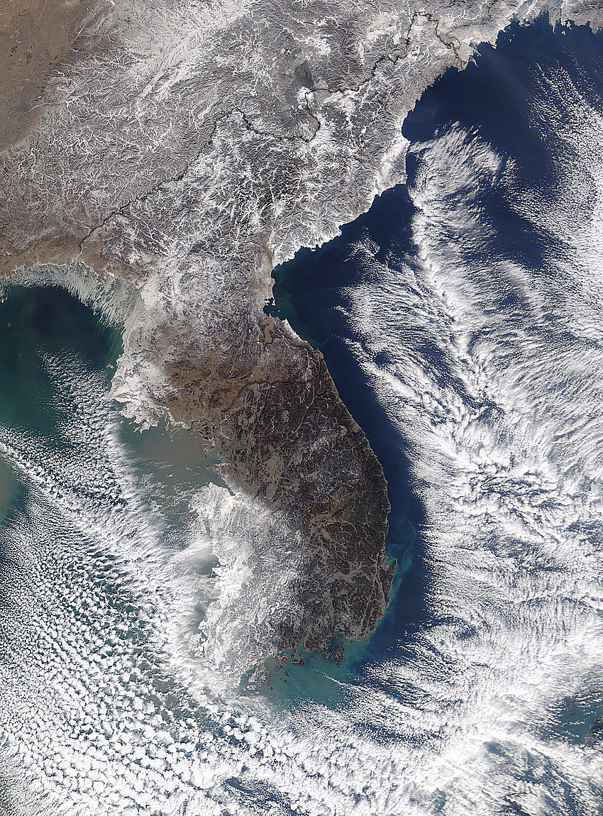 2016년 1월 25일, 폭설이 내린 이후 한반도를 촬영한 위성사진